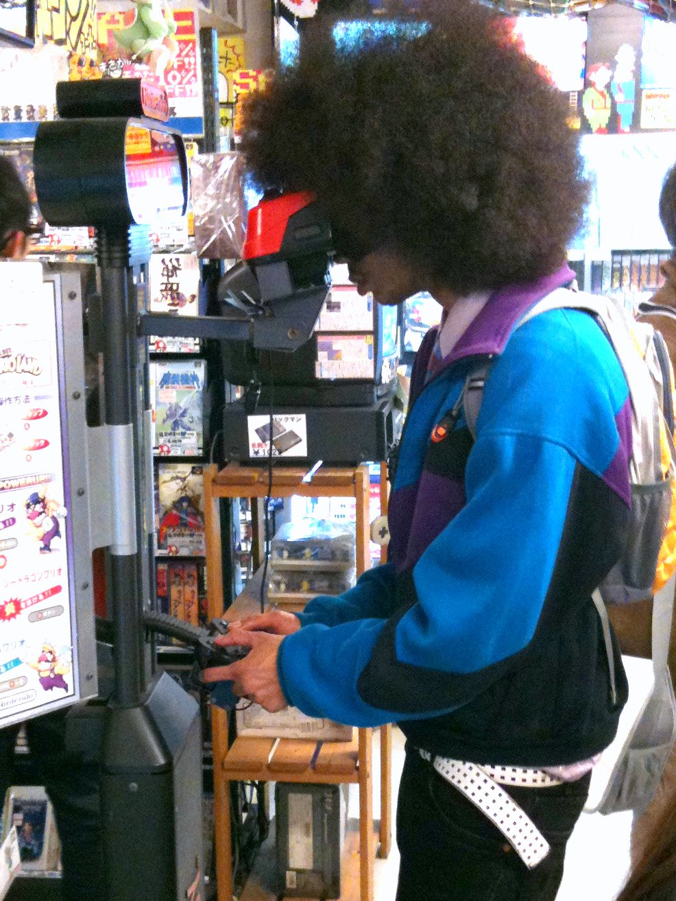 Virtual 'fro